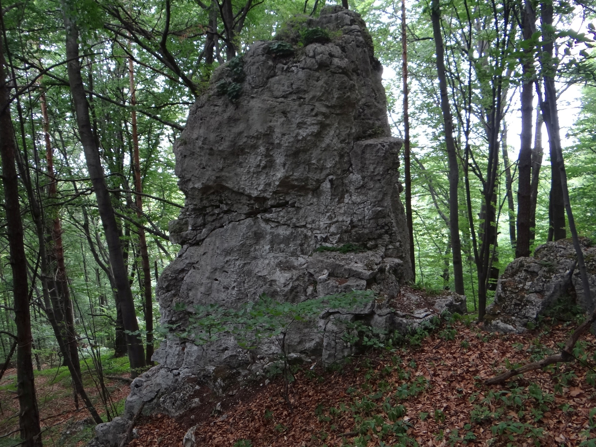 Skała Gips VII na wzgórzu Łężec między Morskiem i Podlesicami